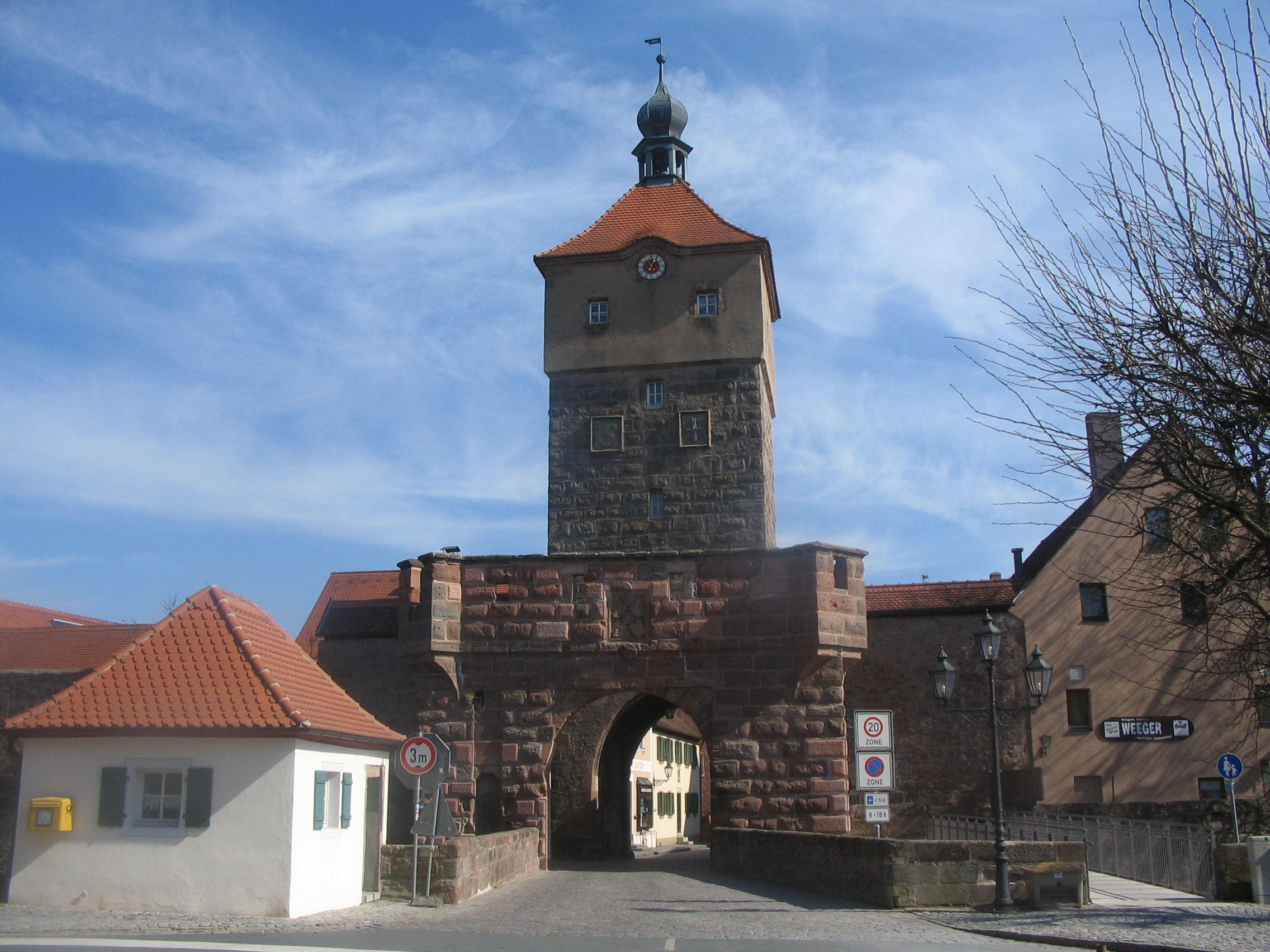 Oberes Tor ("upper gate") in Wolframs-Eschenbach.